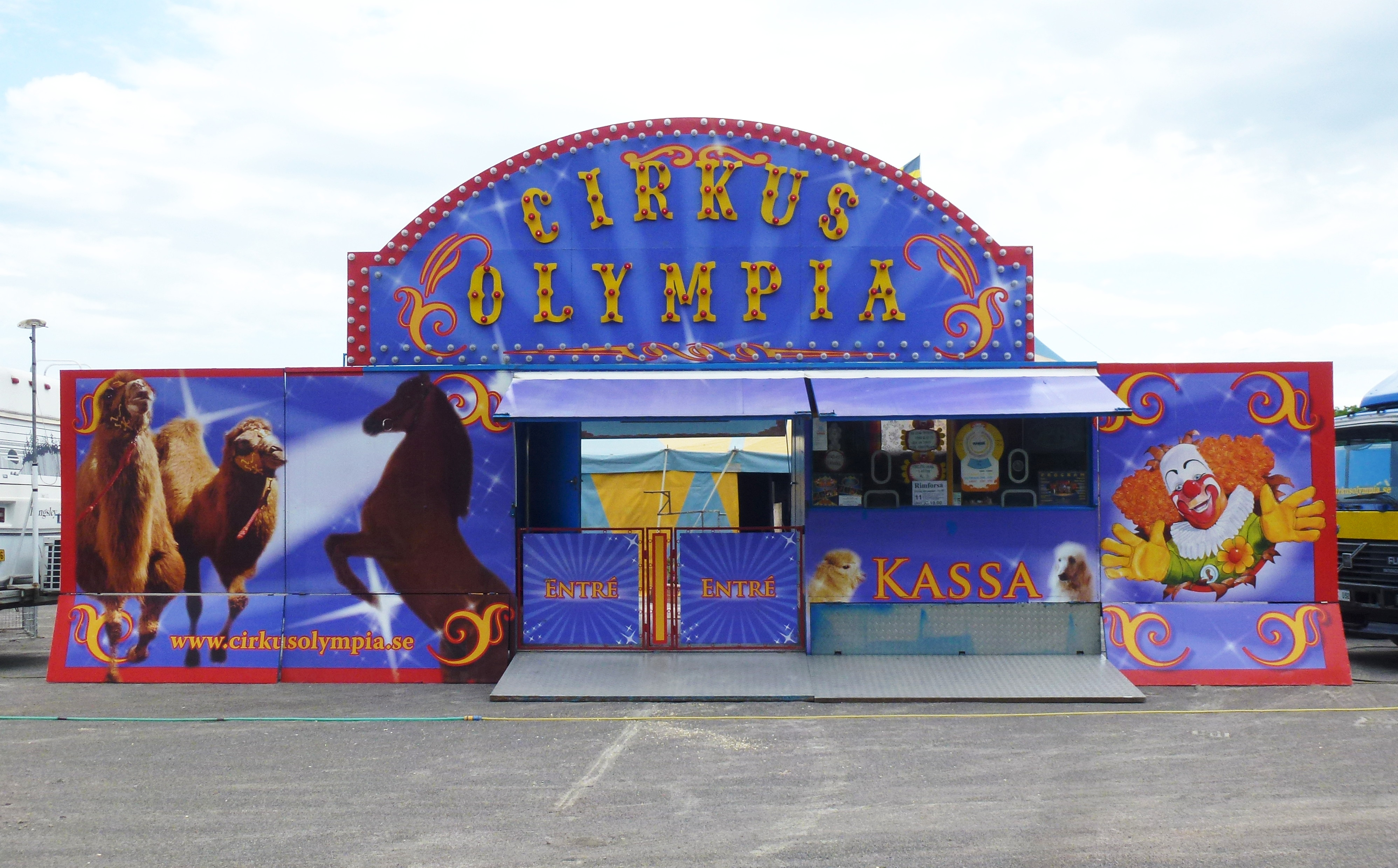 Cirkus Olympias entré